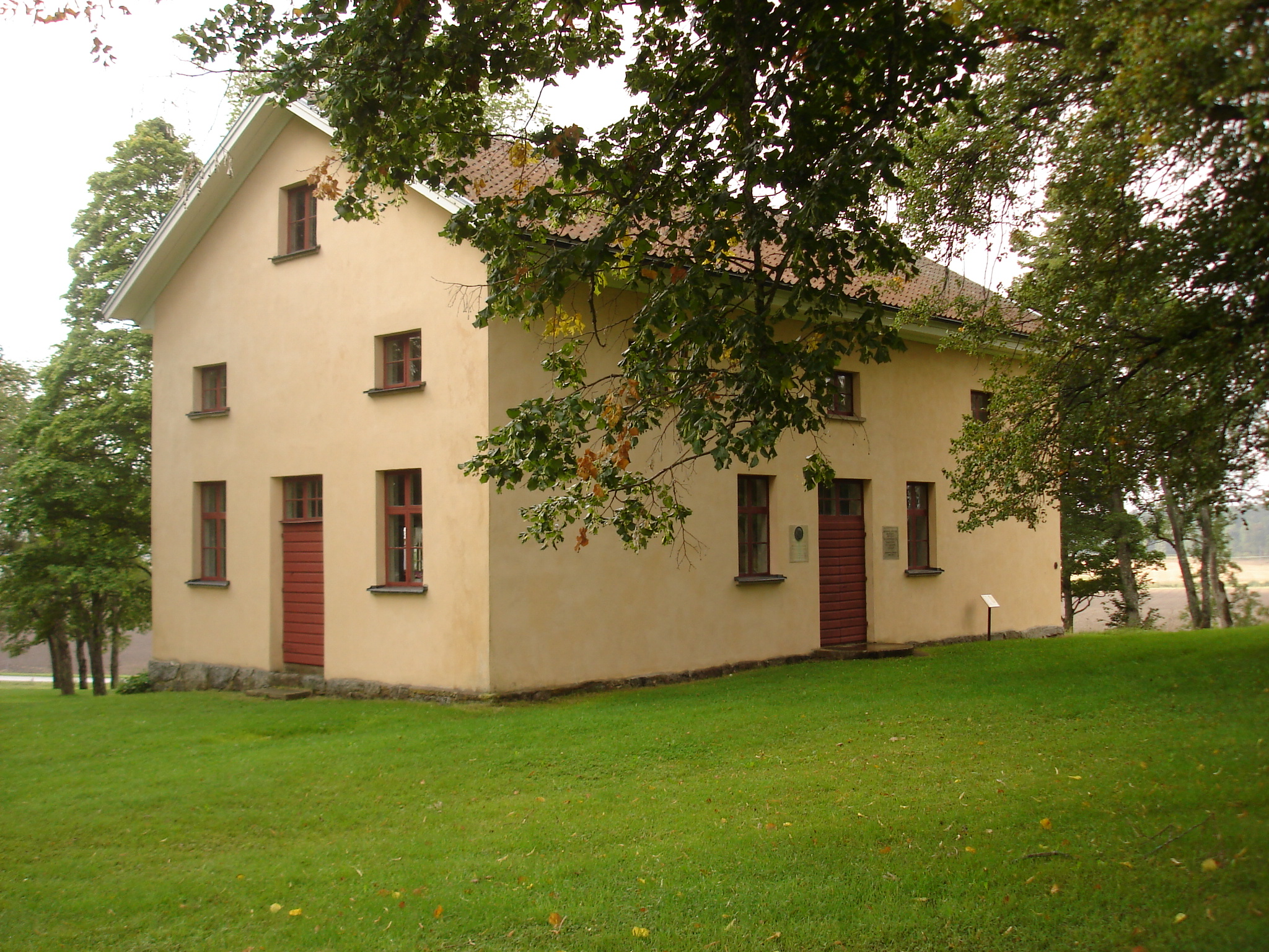 Sett från NO